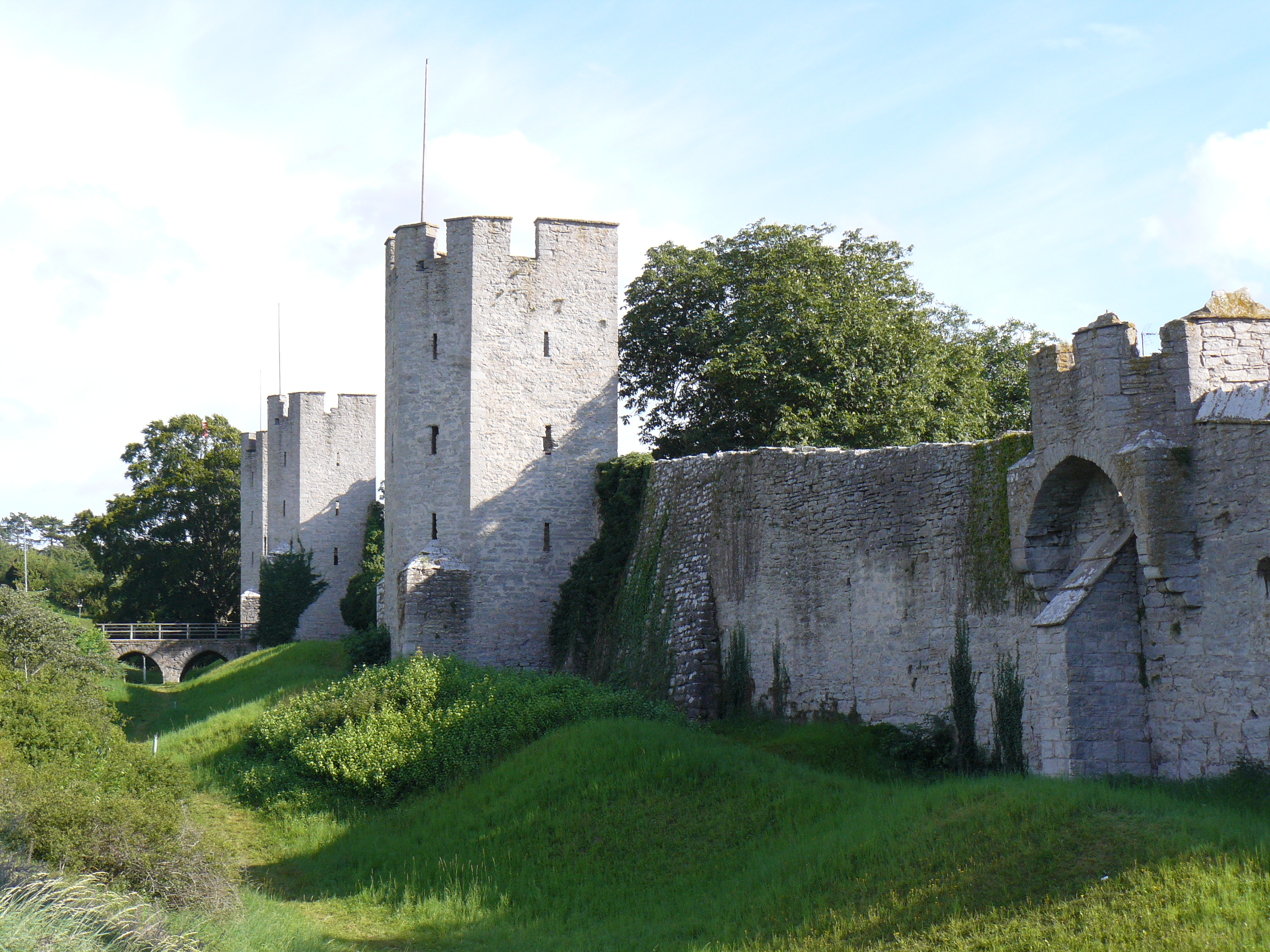 Zdjęcie zrobione w Visby w sierpniu 2007 roku.